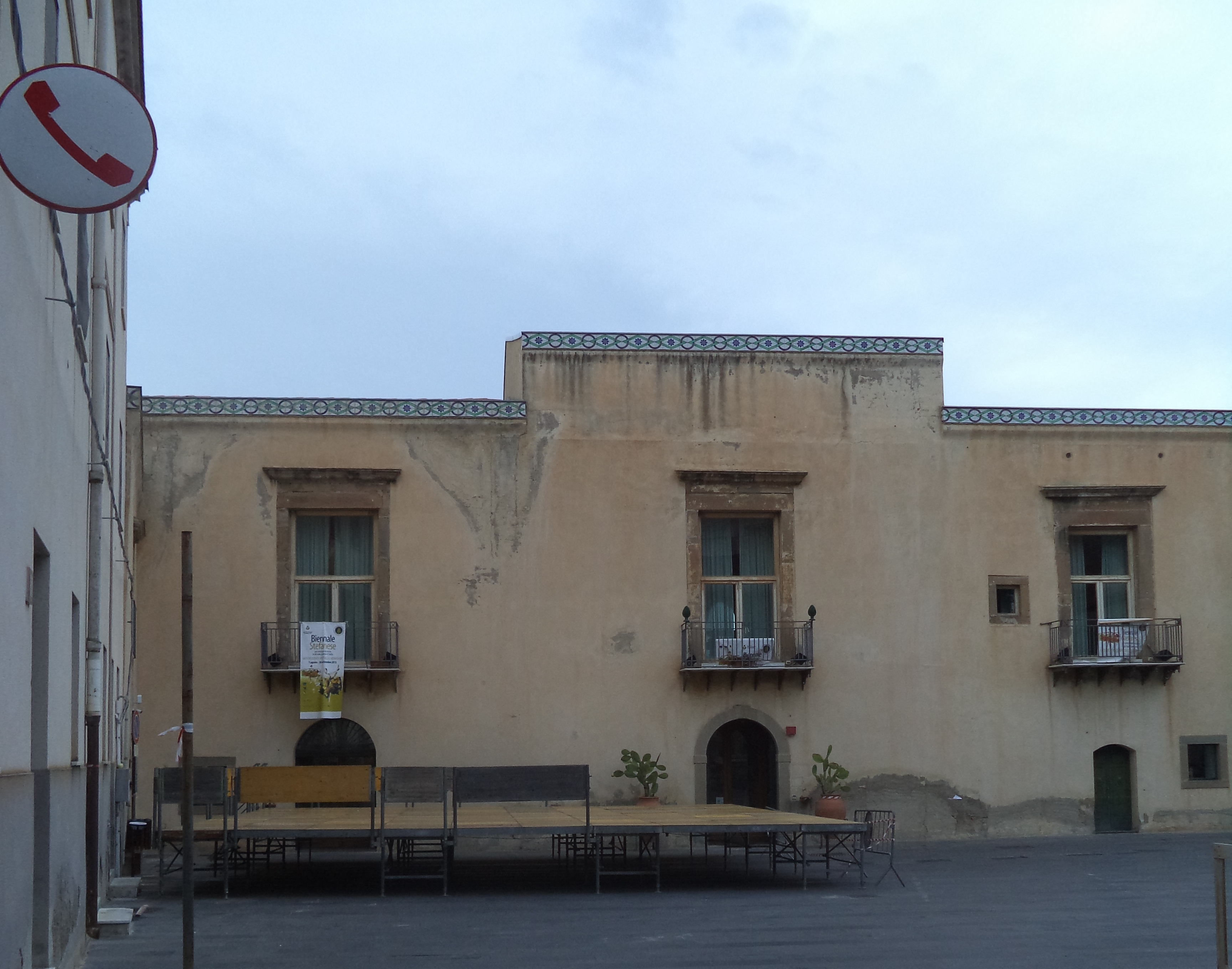 Santo Stefano di Camastra